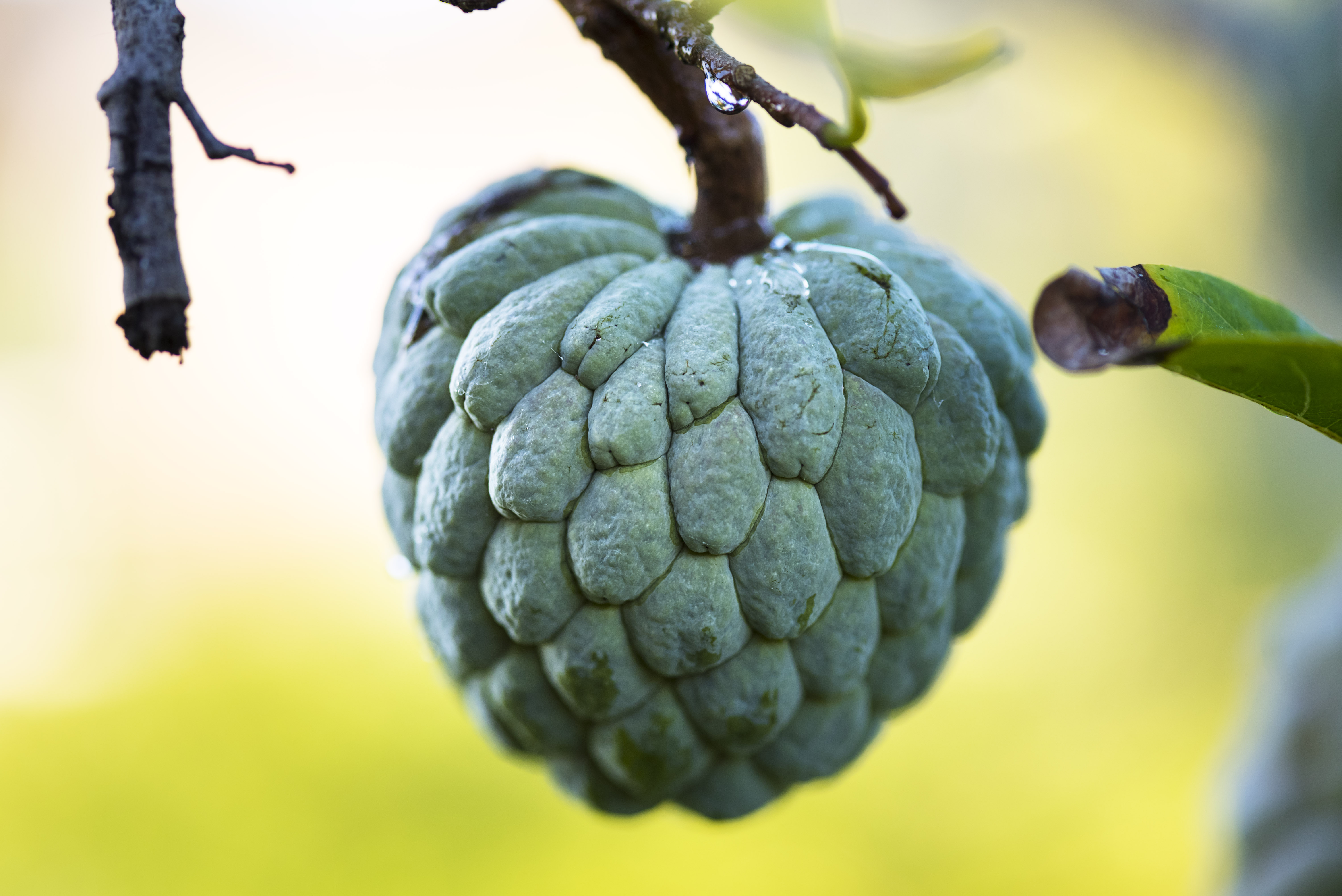 Pinha no pé.